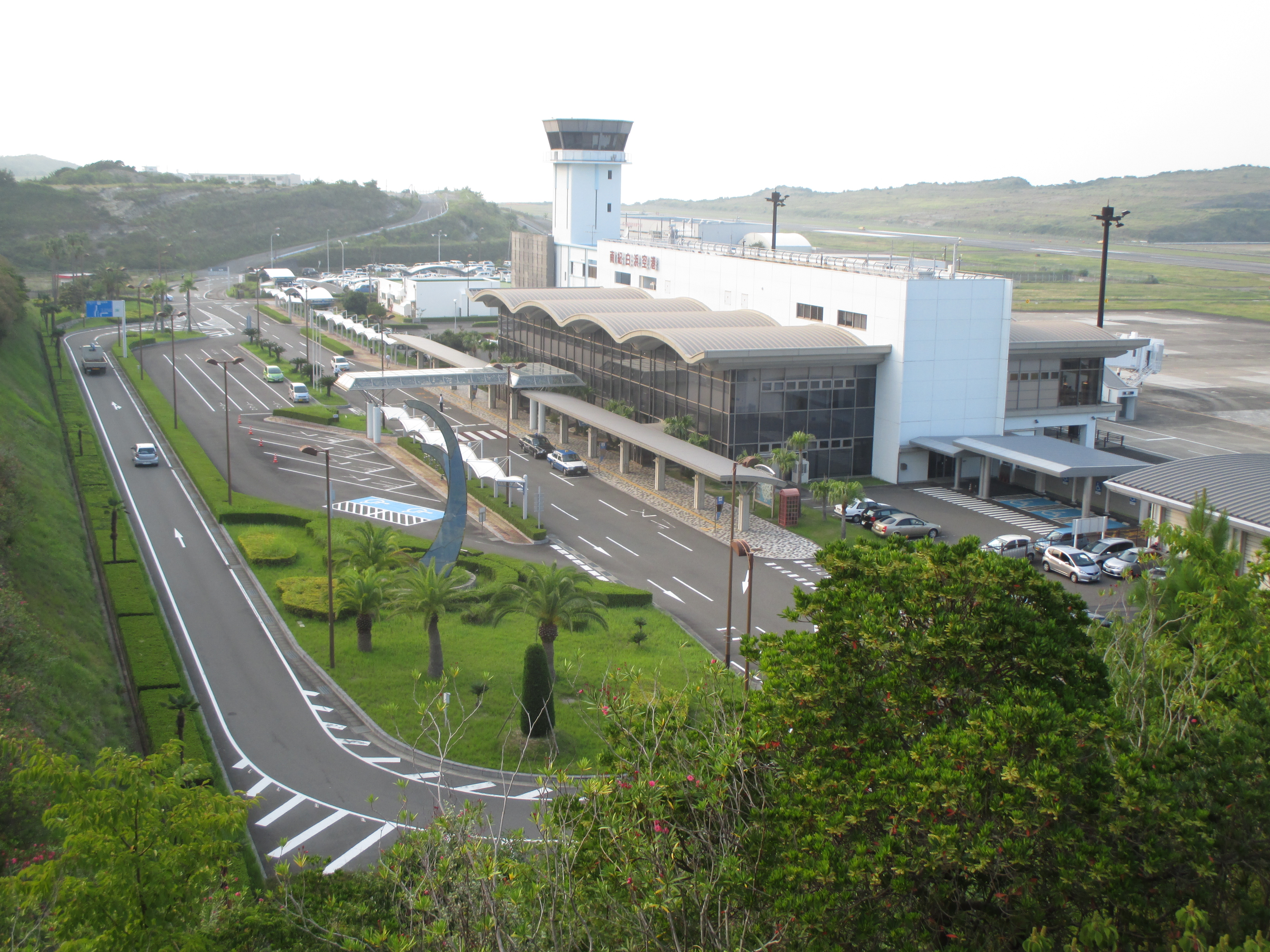 南紀白浜空港 Nanki Shirahama Airport/SHM